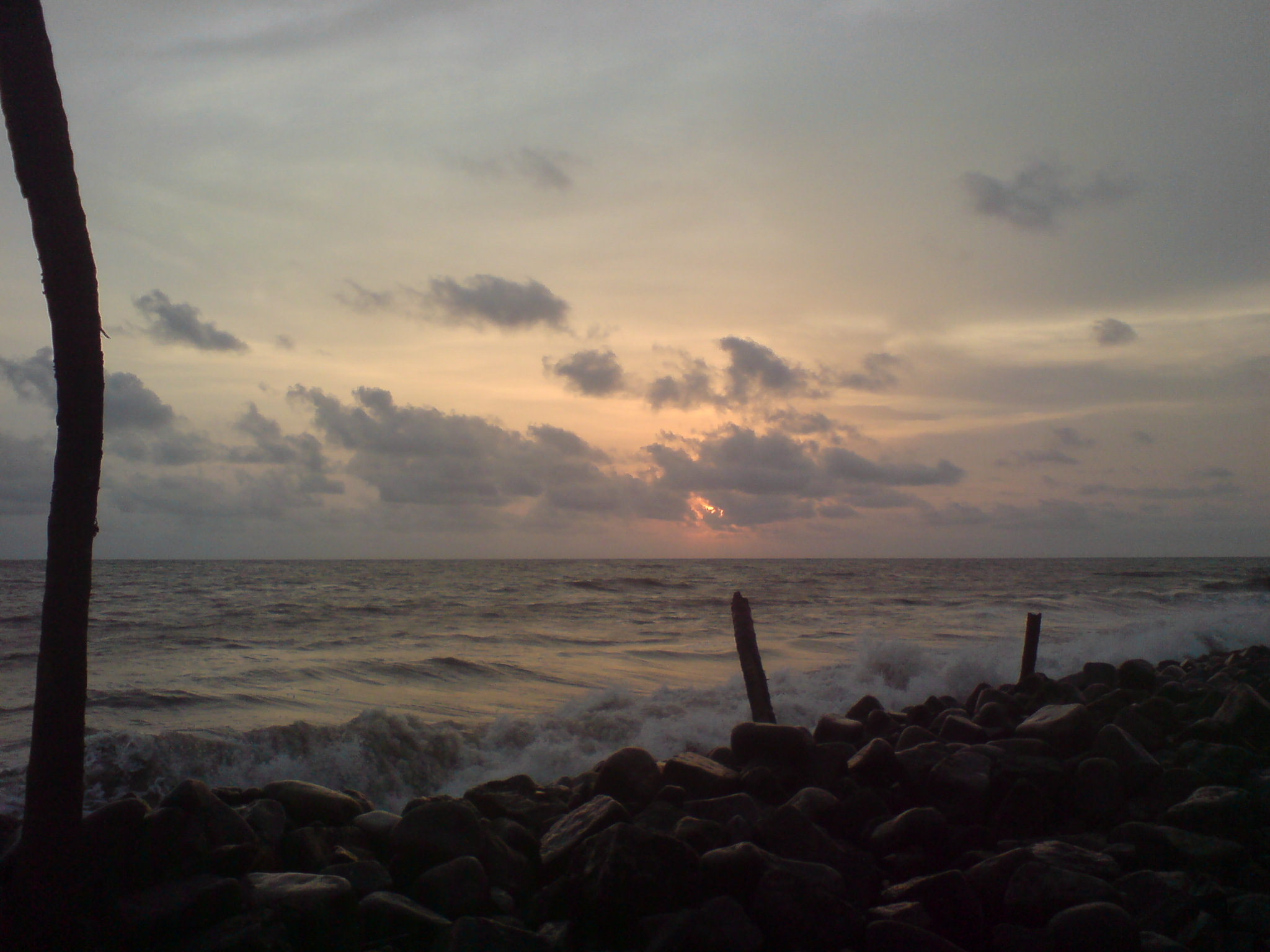 NATTIKA BEACH